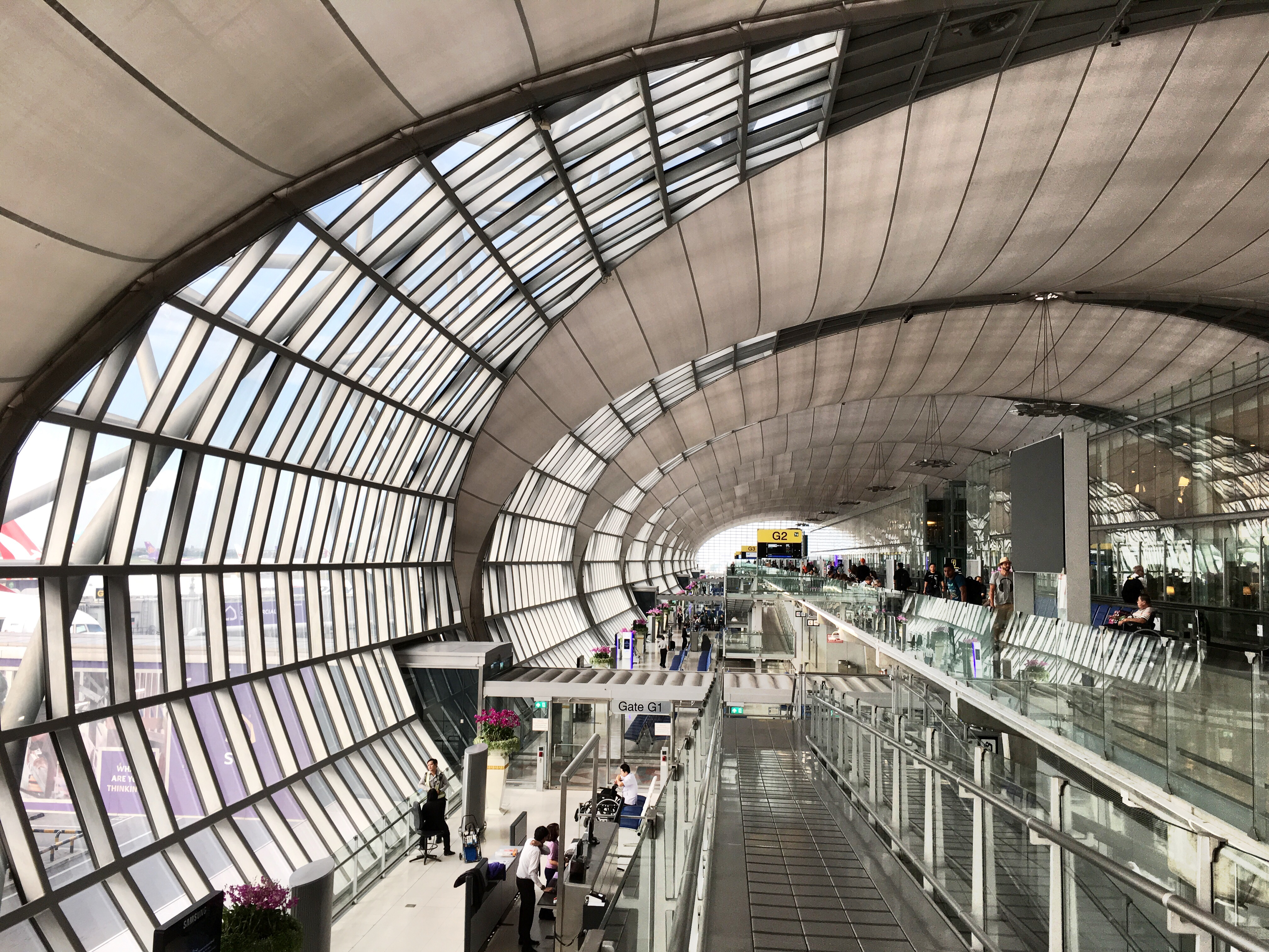 Suvarnabhumi architecture